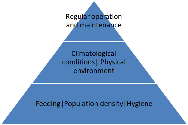 Three levels of key factors to successful snail farming